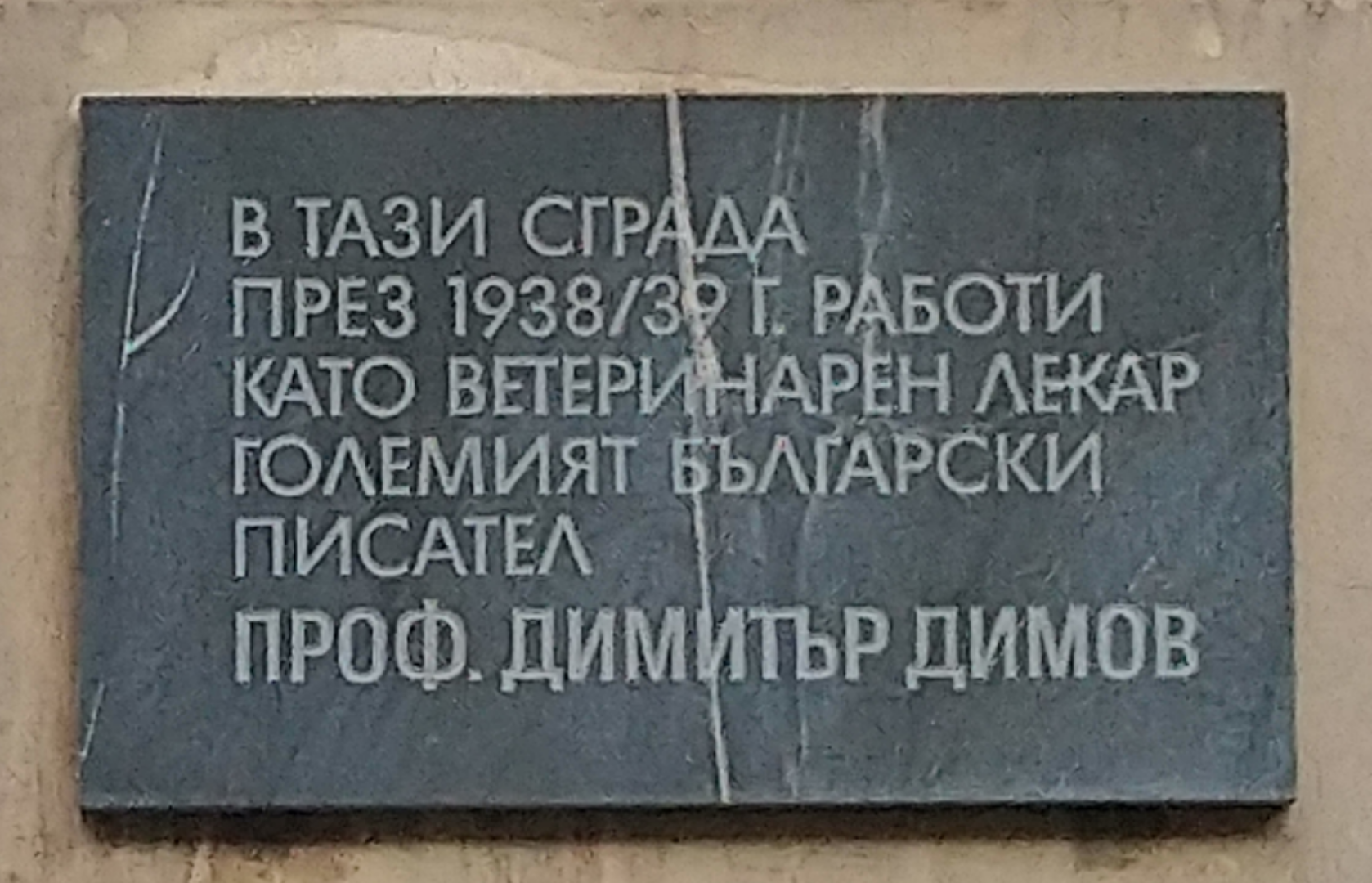 Паметната плоча на писателя Димитър Димов в Бургас, ул. Хан Аспарух 36